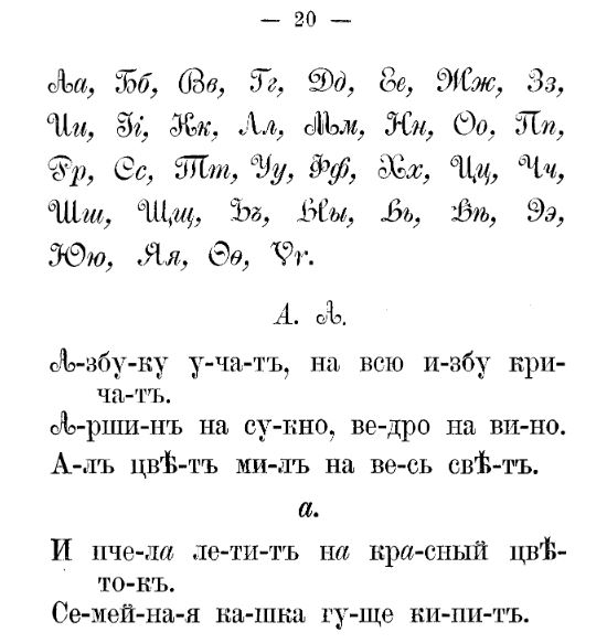 "Азбука" Льва Толстого, 1872, стр. 20